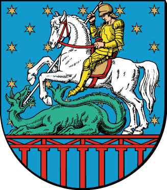 Holstebro våben